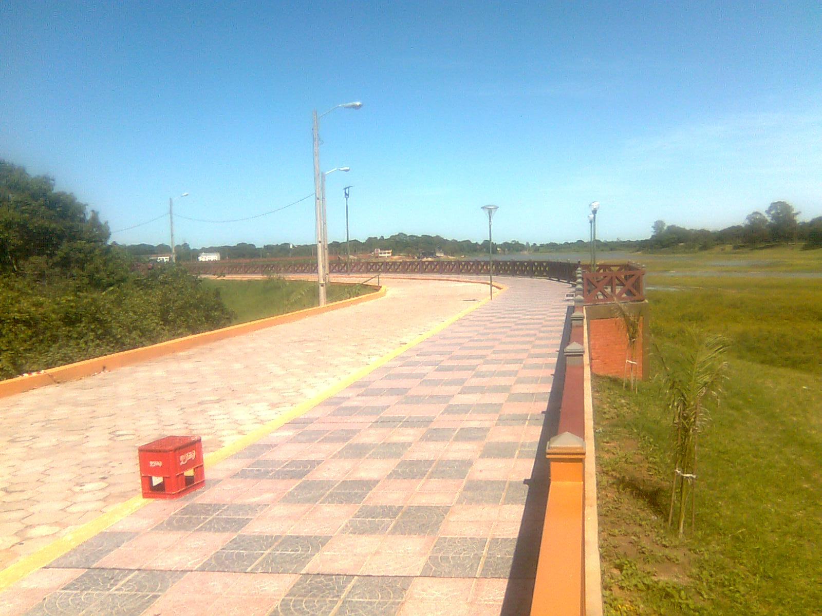 Ampliación del muro a costanera 2012